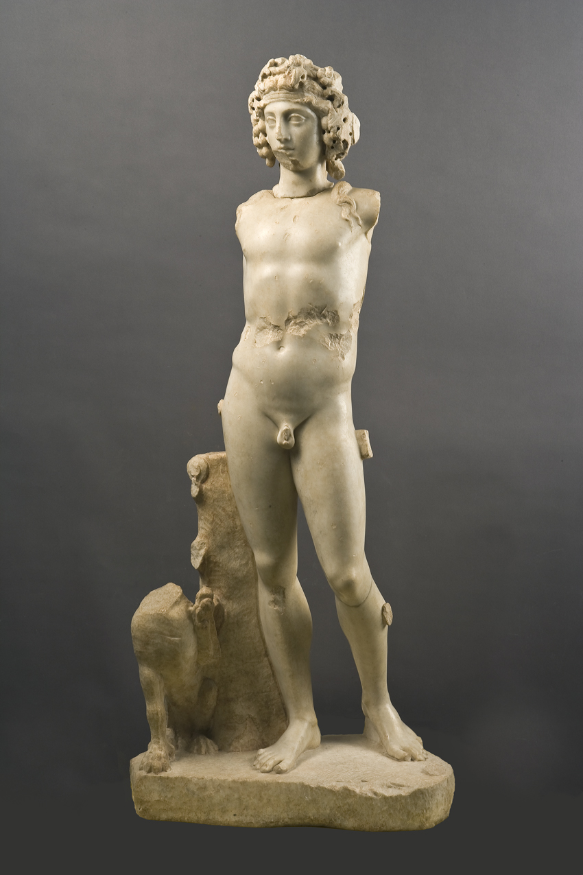 Dios Baco. Procedencia Chirivel, Almería.